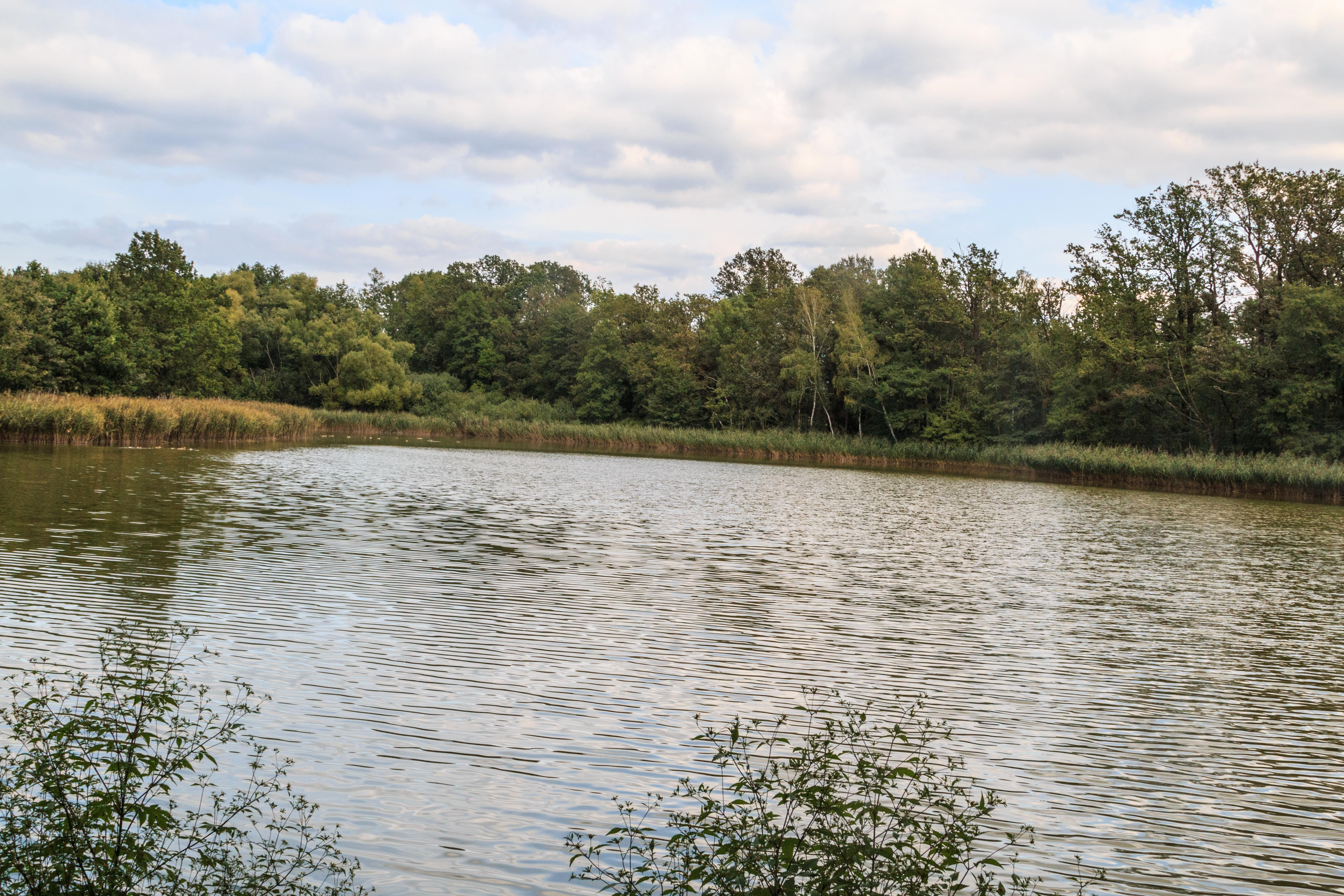 Franclinský rybník